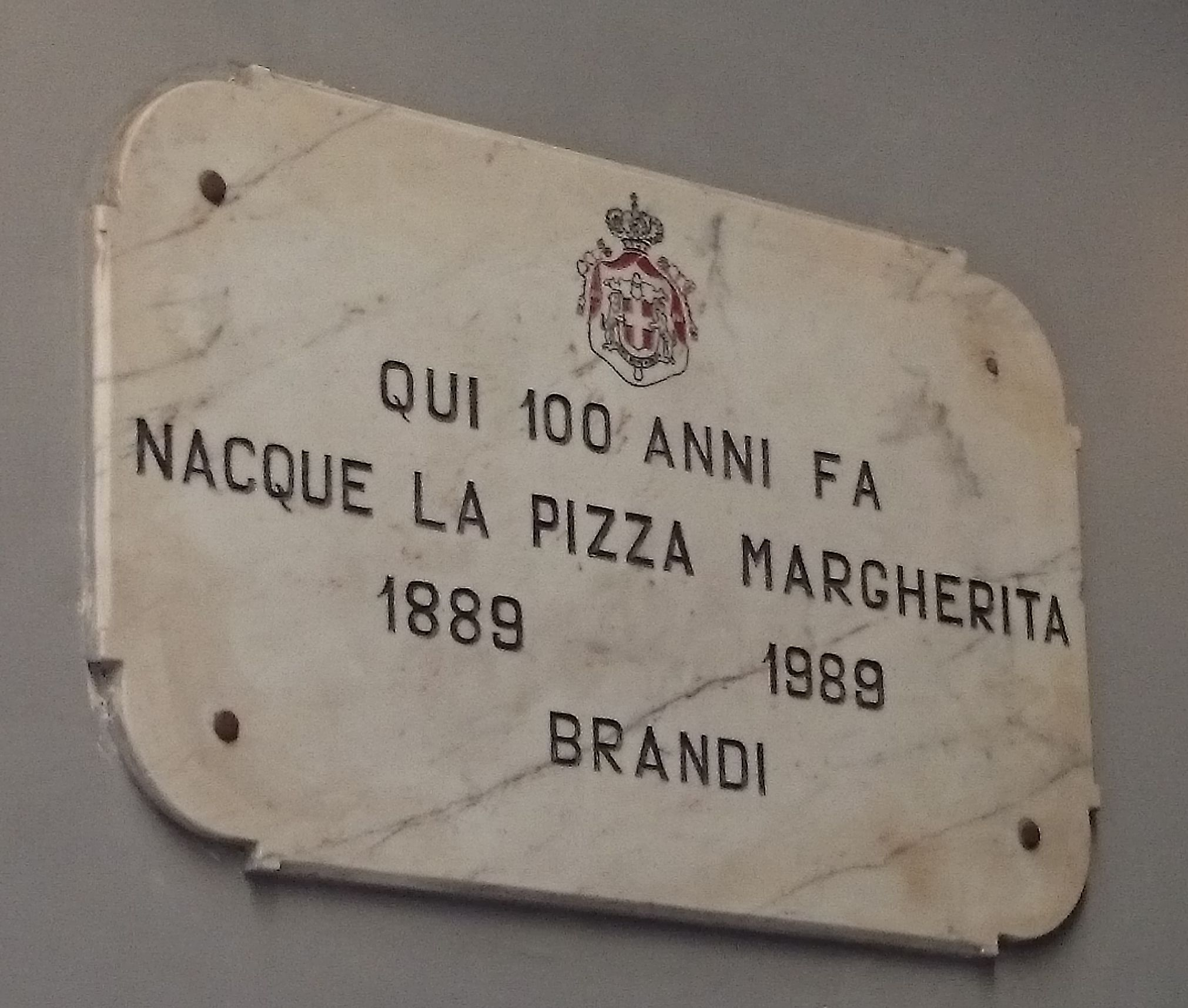 Invention of the Pizza Margherita